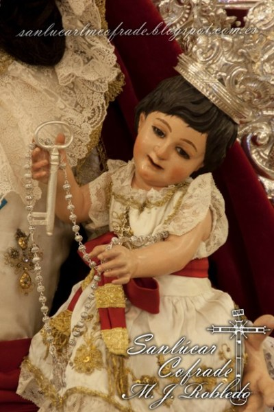 Imagen en la que se aprecia en la mano derecha del Divino Infante las llaves de su parroquia